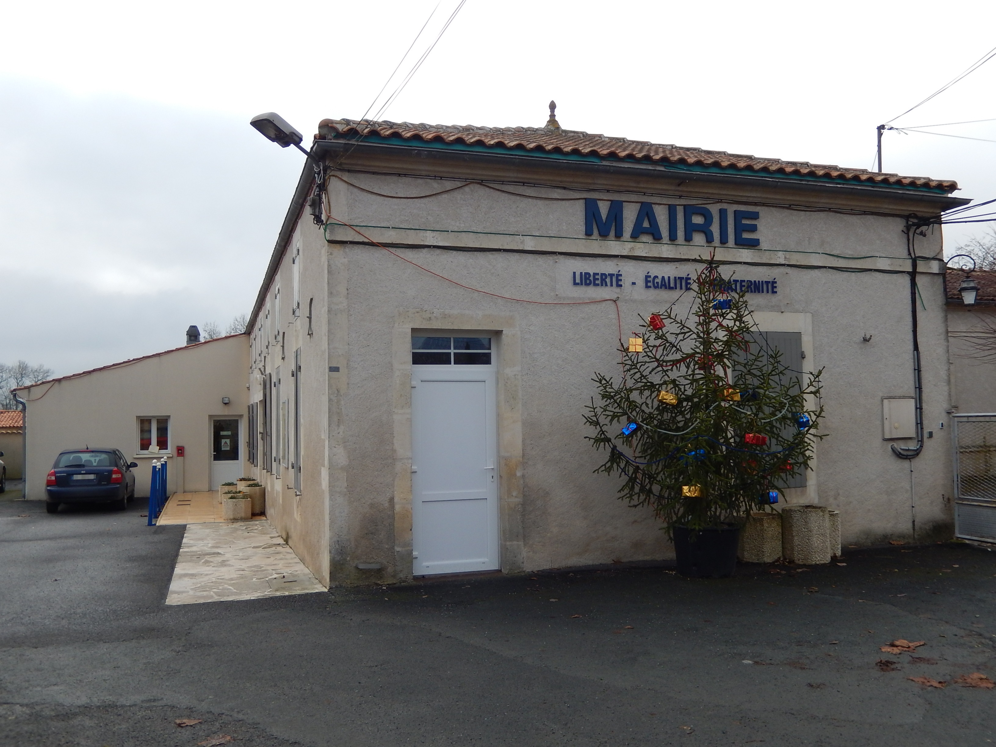 La mairie de la commune d'Aumagne, en Charente-Maritime.